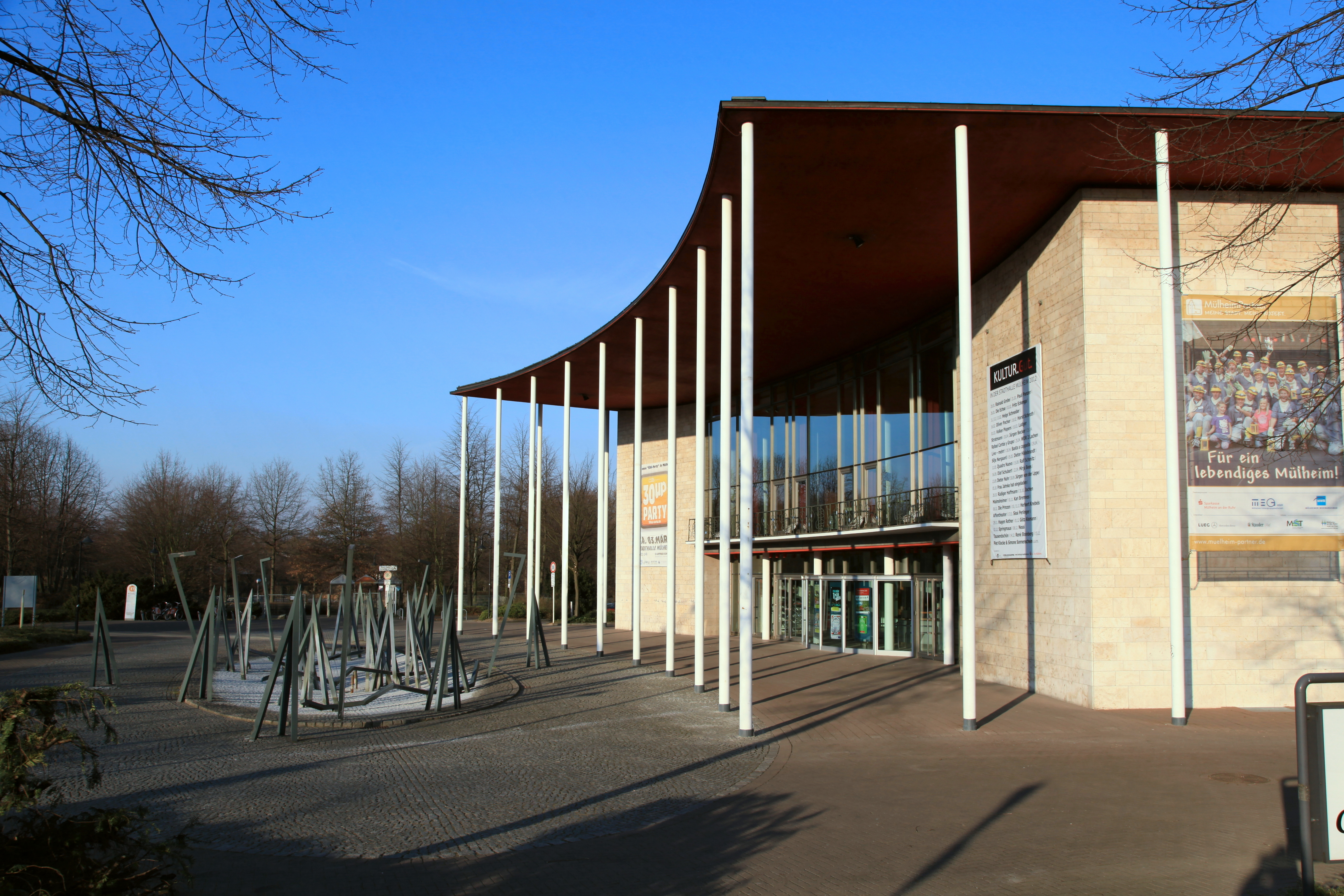 Stadthalle am Theodor-Heuss-Platz in Mülheim an der Ruhr